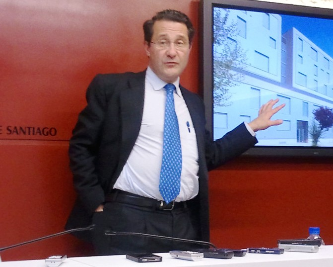 Gerardo Conde Roa ex-alcalde de Santiago de Compostela nunha presentación.